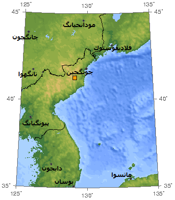 هزَّةٌ أرضيَّة تسببت بها إحدى تجارب كوريا الشماليَّة النوويَّة التي أُجريت في باطن الأرض. اللون البُرتُقالي يُشير إلى النهار الذي وقعت فيه التجربة (25 أيَّار - مايو - 2009م)، وحجم المُربَّع البُرتُقالي يُشير إلى قُوَّة الزلزلة (4.7 درجات).